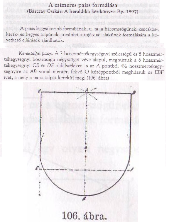 A doborpajzs szerkesztése